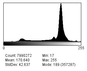 Histo gato rgb